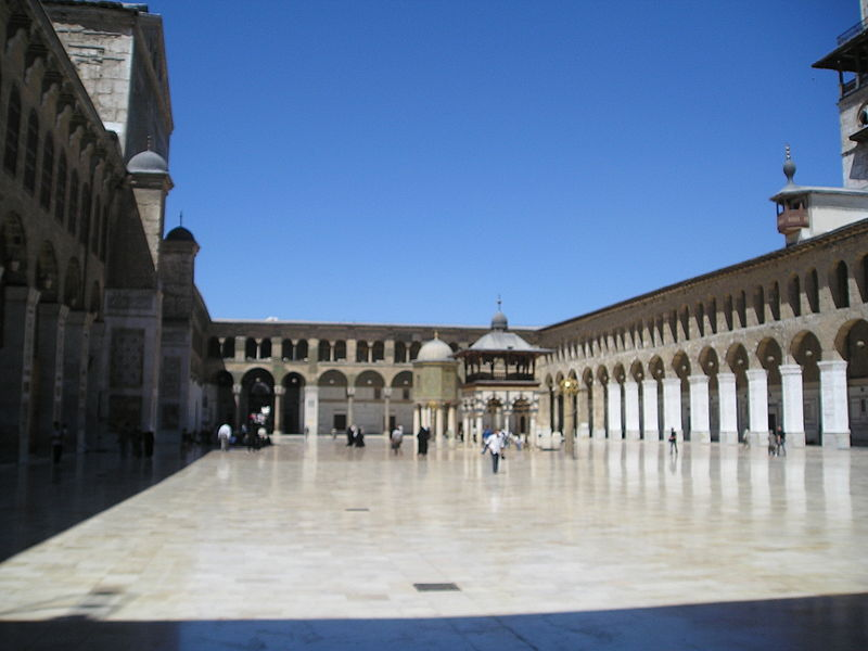 کوردی: مزگەوتی گەورەی ئەمەویی لە دیمەشق